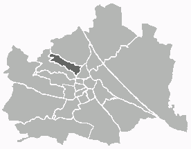 Positionskarte des 18. Wiener Gemeindebezirks Unter Verwendung einer Vorlage von Extrawurst. Public Domain.